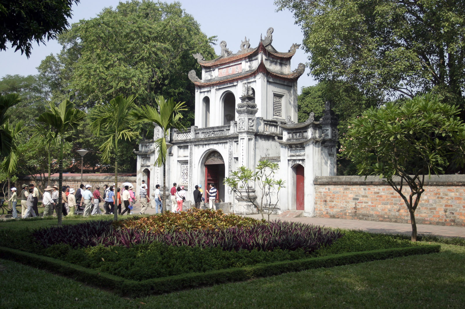 Văn miếu môn.